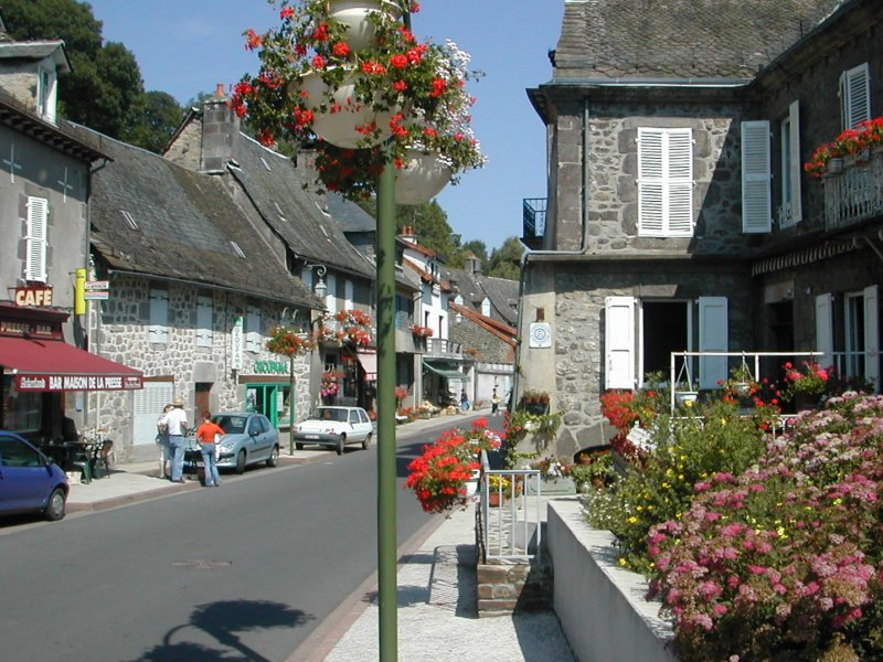 Vue du village de Saint Cernin (Cantal, France).